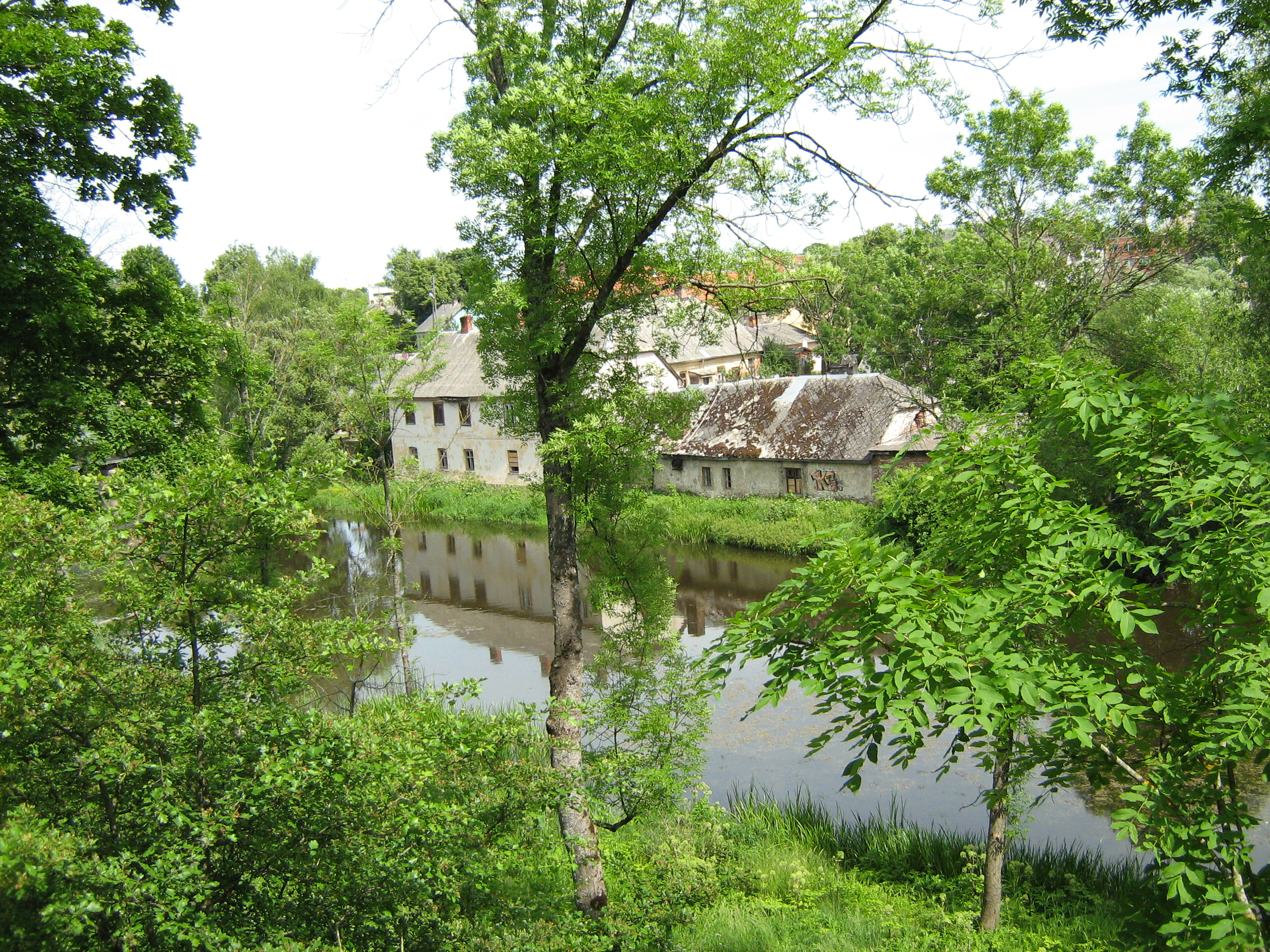 Beržė upė pietų Latvijoje